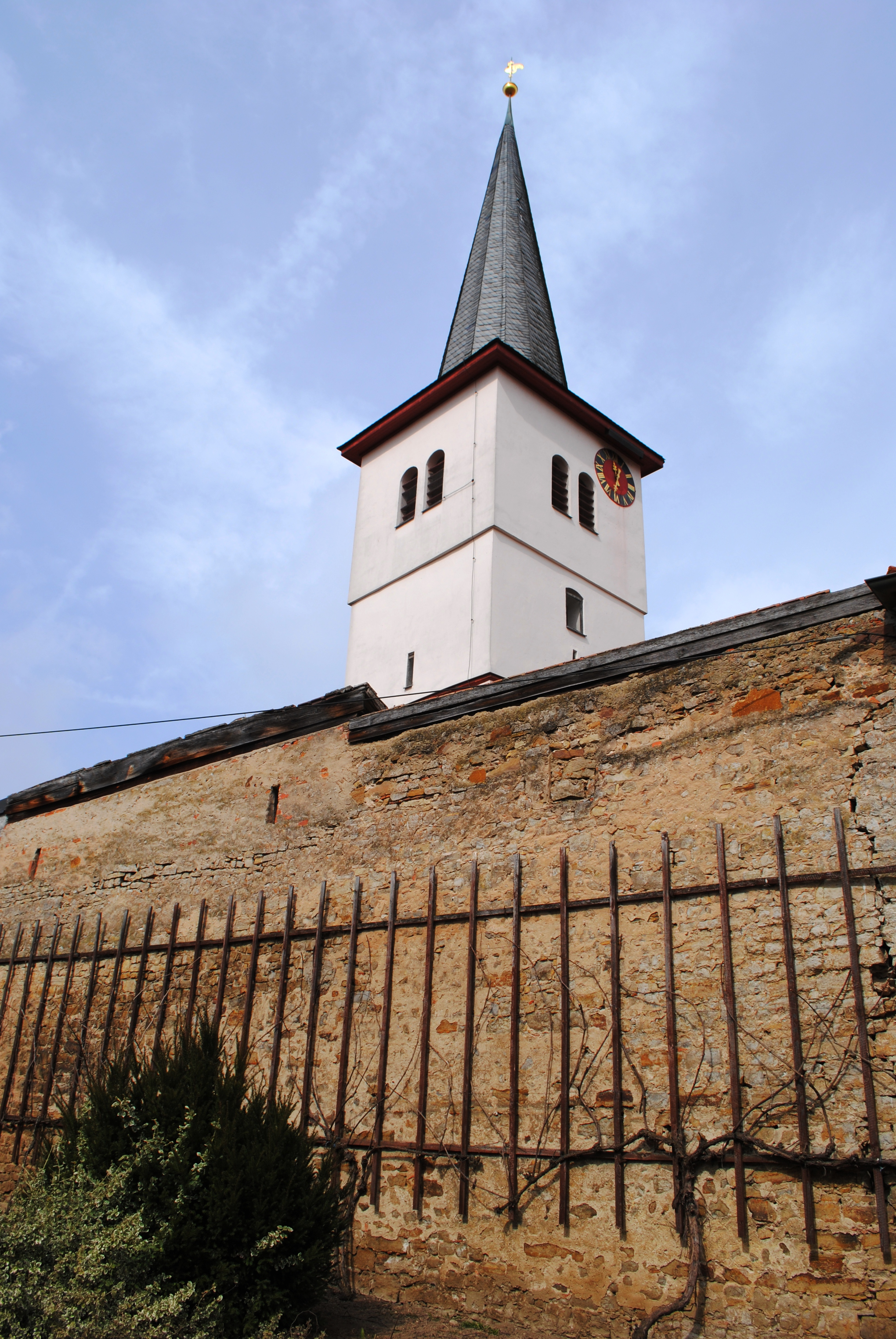 Kirchgaden, Kirche Eichfeld, Volkach